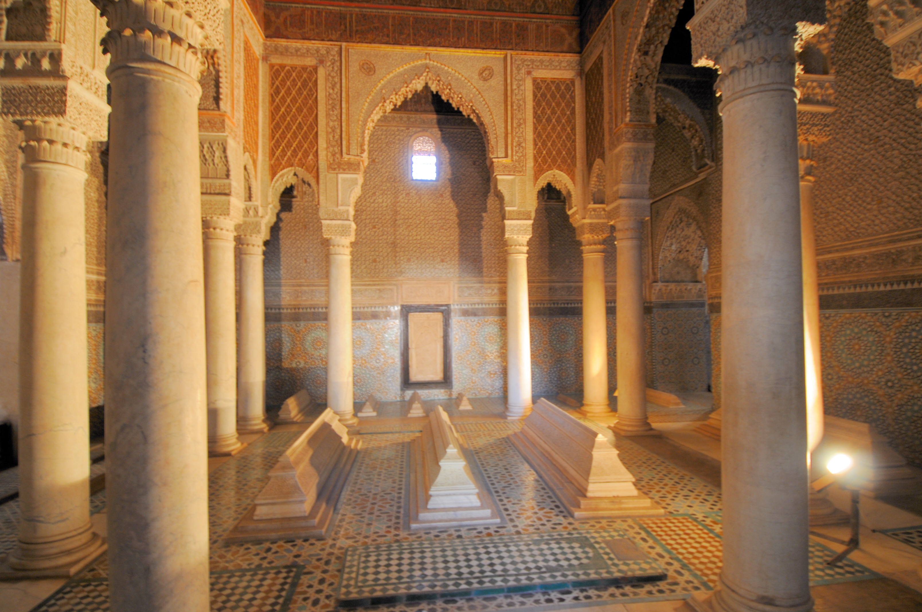 Les_Tombeaux_Saadien_Ali_Ben_Youssef__01_Marrakch.JPG